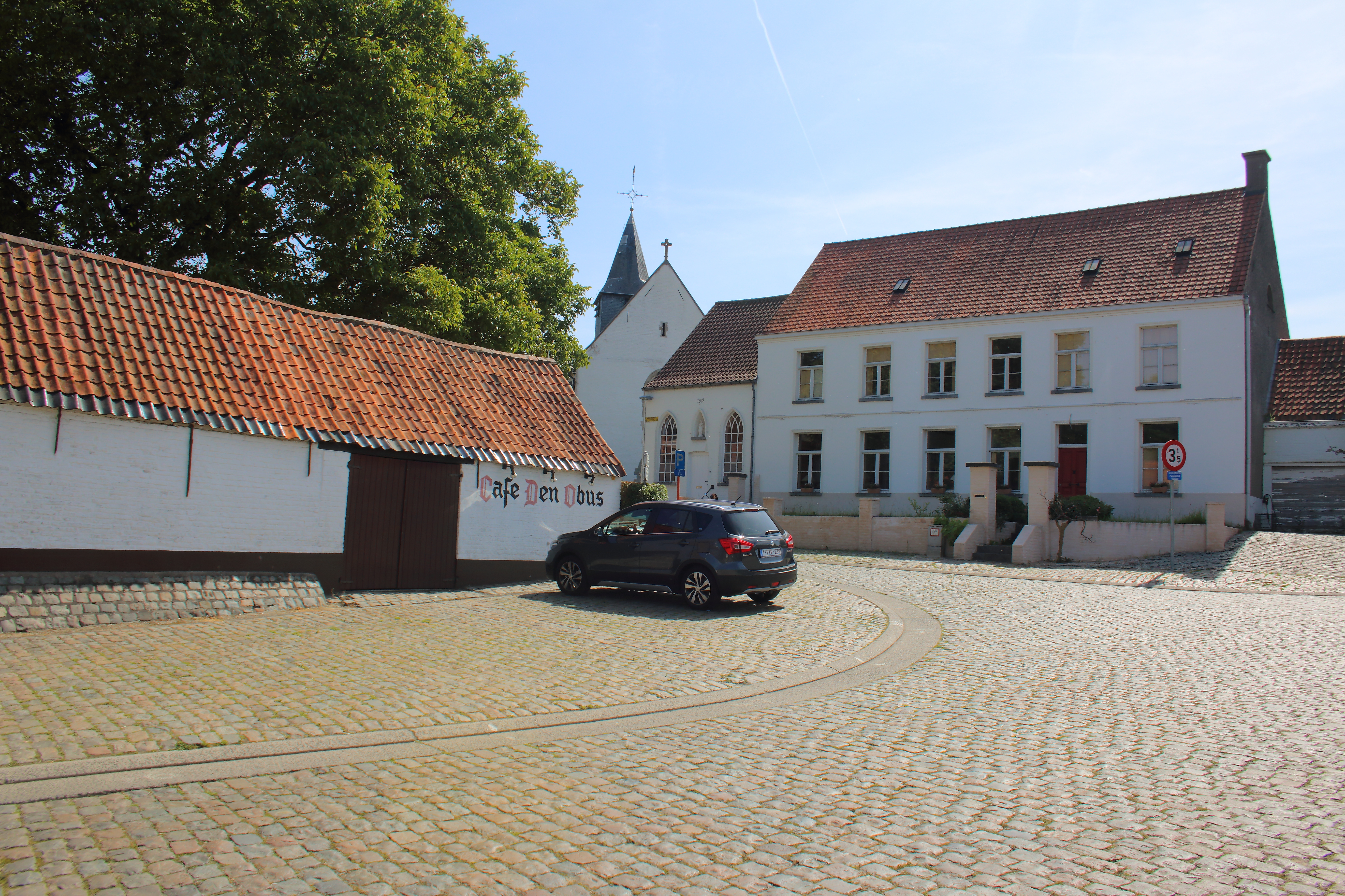 Volkegem, Oudenaarde, Vlaanderen, België